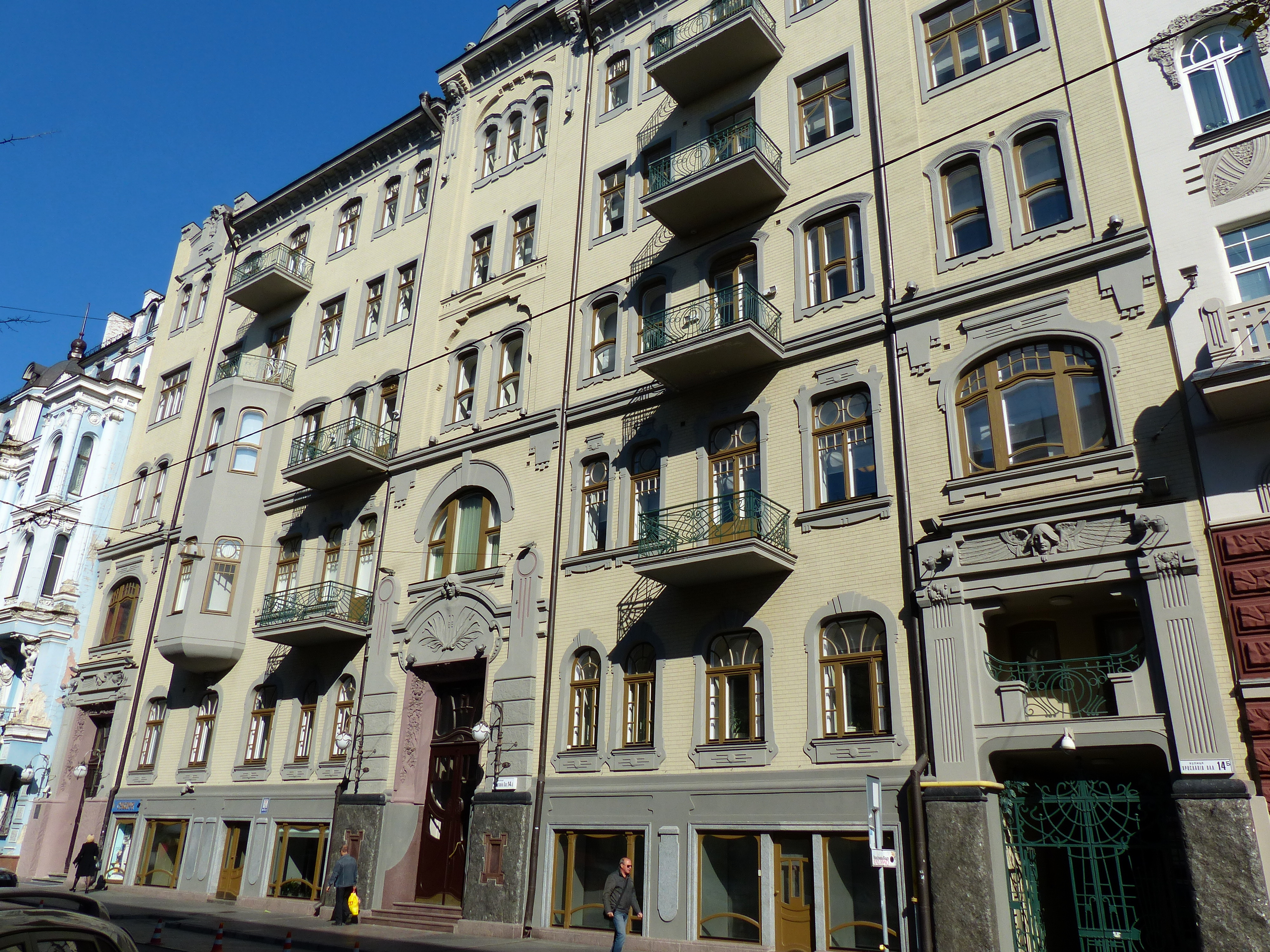 Будинок прибутковий, Київ, Ярославів Вал вул., 14-б